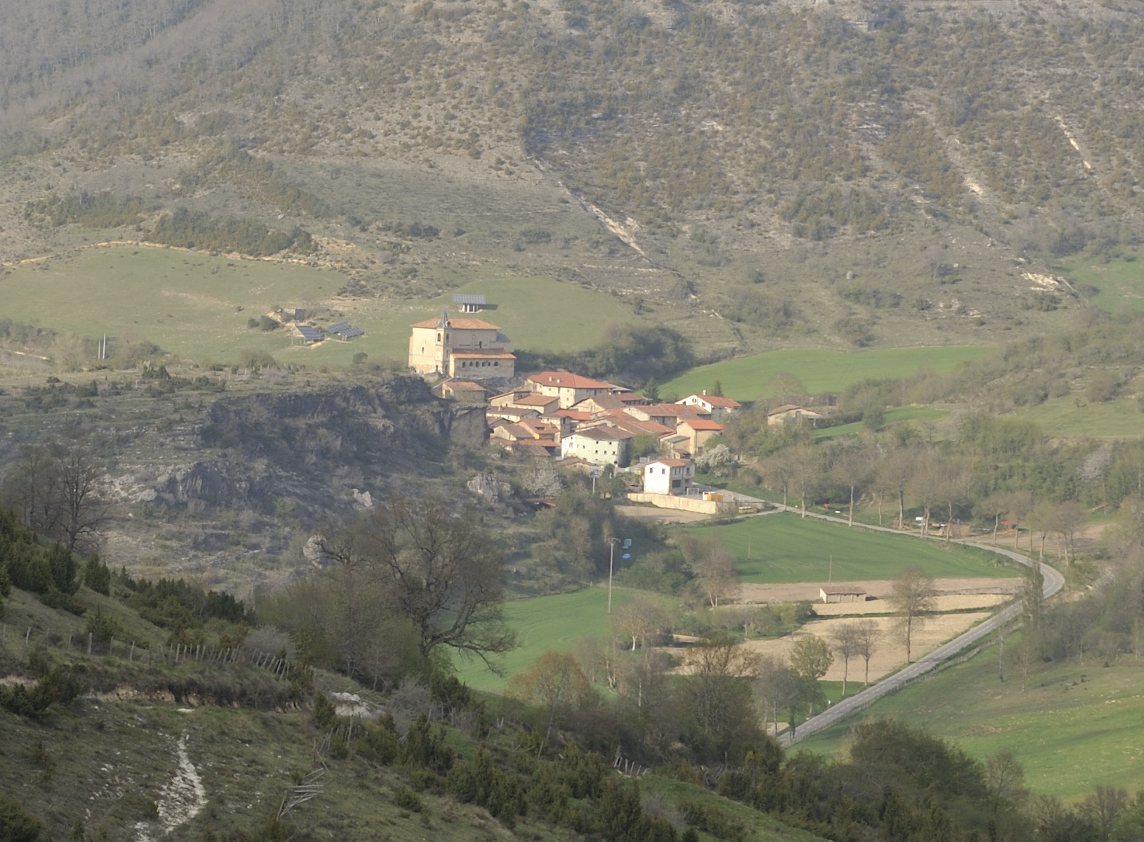 Vista panoramica de Arlucea, en el municipio alavés de Bercedo (País Vasco, España)